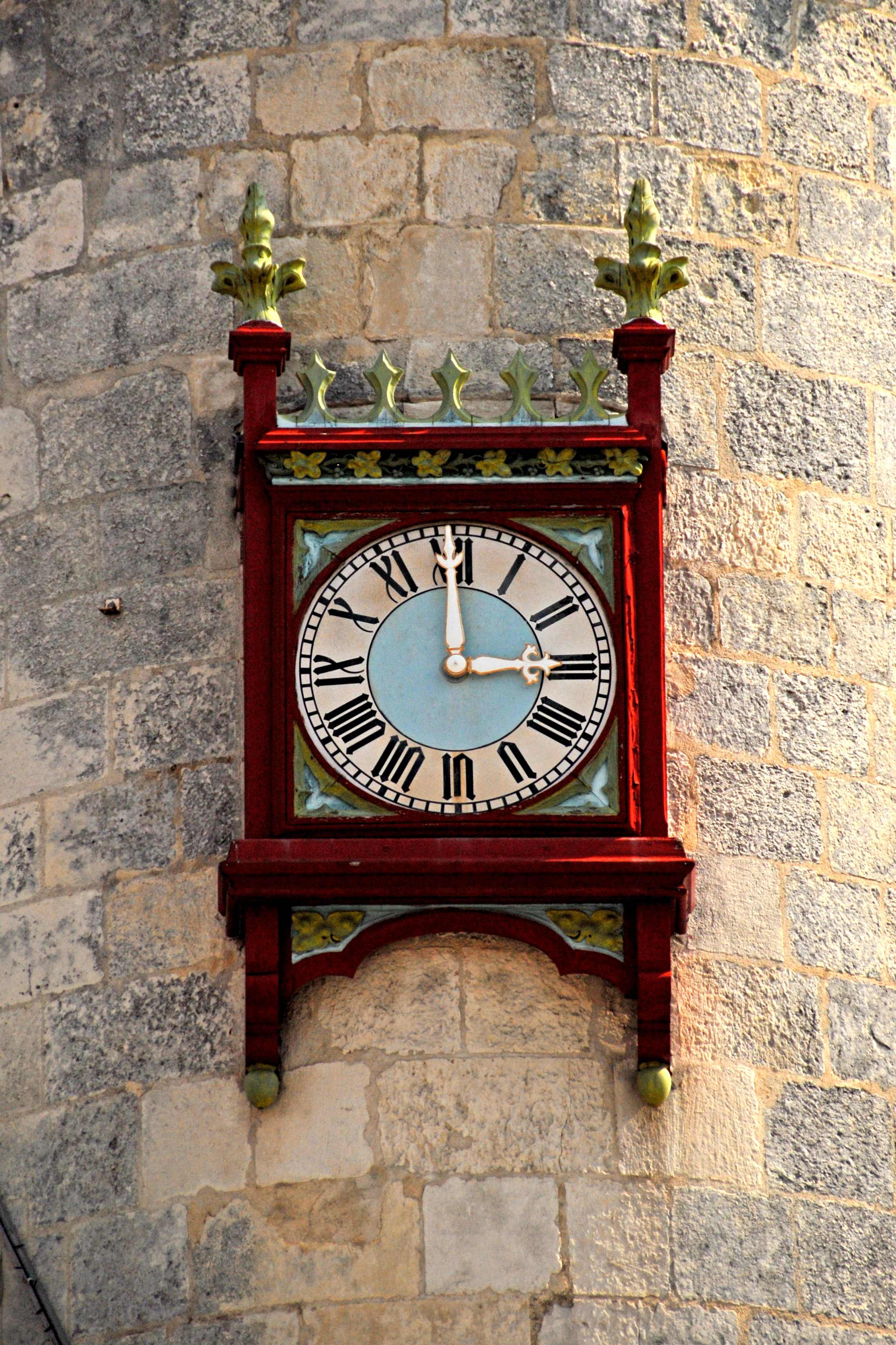 La Rochelle, Uhr am Belfried